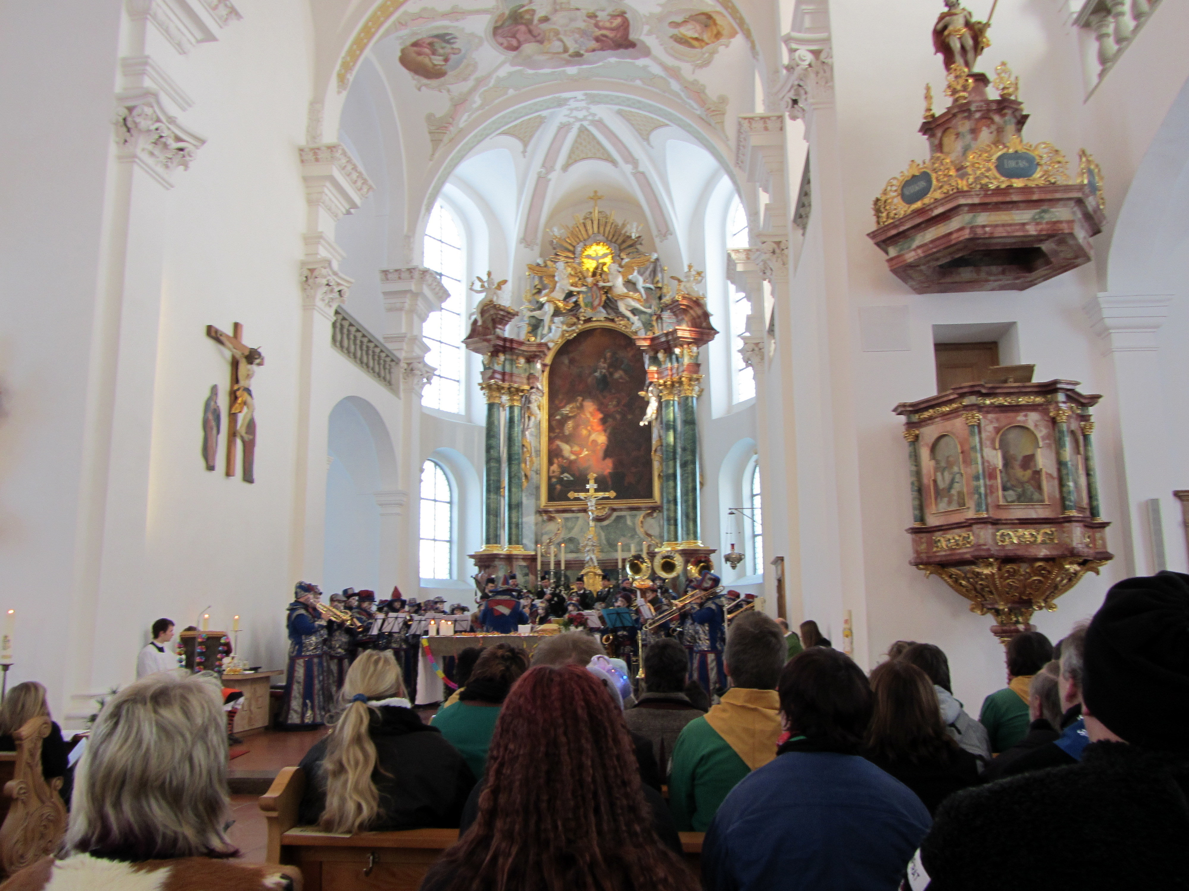 Narrenmesse mit Lumpenkapelle Aitrach (Guggamusik)